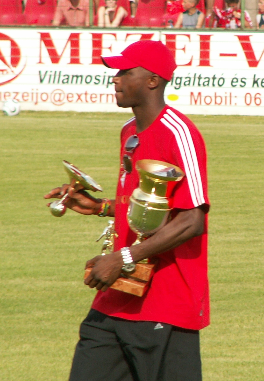 Ibrahima Sidibe a 2006-2007-es szezon legjobb debreceni labdarúgójának járó Zilahi Zoltán-díjjal